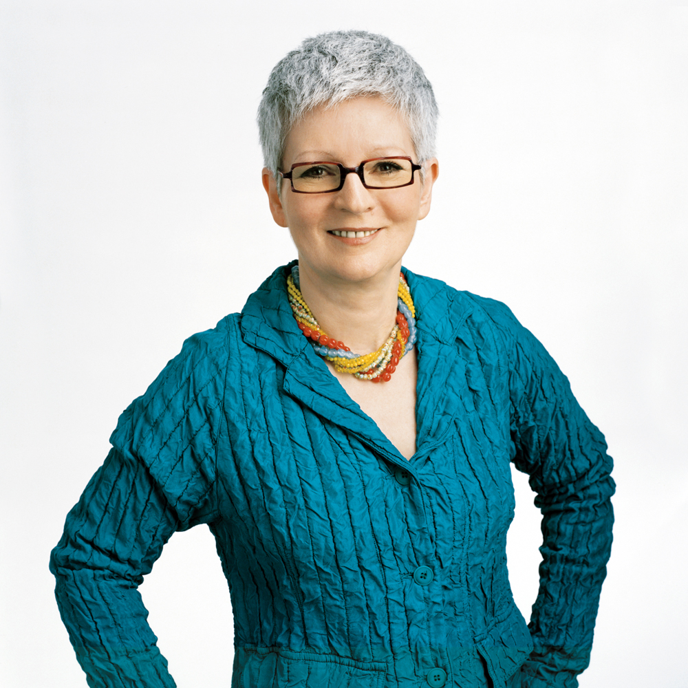 Susanne Jerusalem. Wiener Landtagsabgeordnete und Mitglied des Wiener Gemeinderats (Die Grünen)